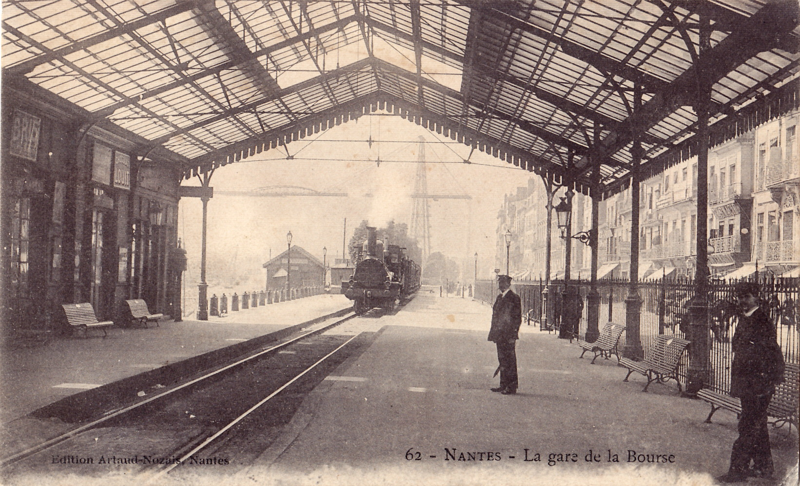 Carte postale ancienne éditée par Artaud et Nozais à Nantes, n°62 :NANTES - La Gare de la Bourse.En arrière plan figure le pont transbordeur inauguré le 3 août 1903.